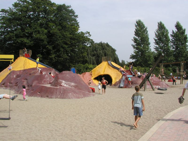 Großer Spielplatz in den Großen Wallanlagen in der Hamburger Neustadt.